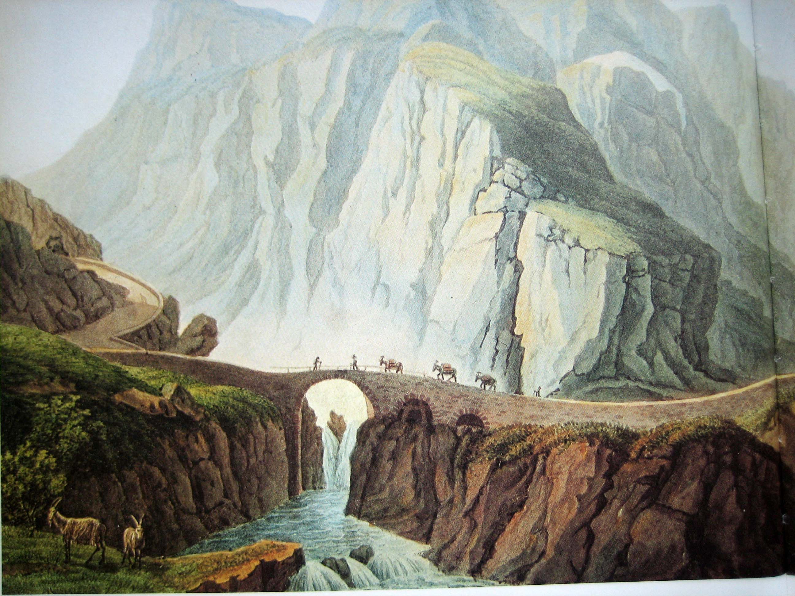 Teufelsbrücke